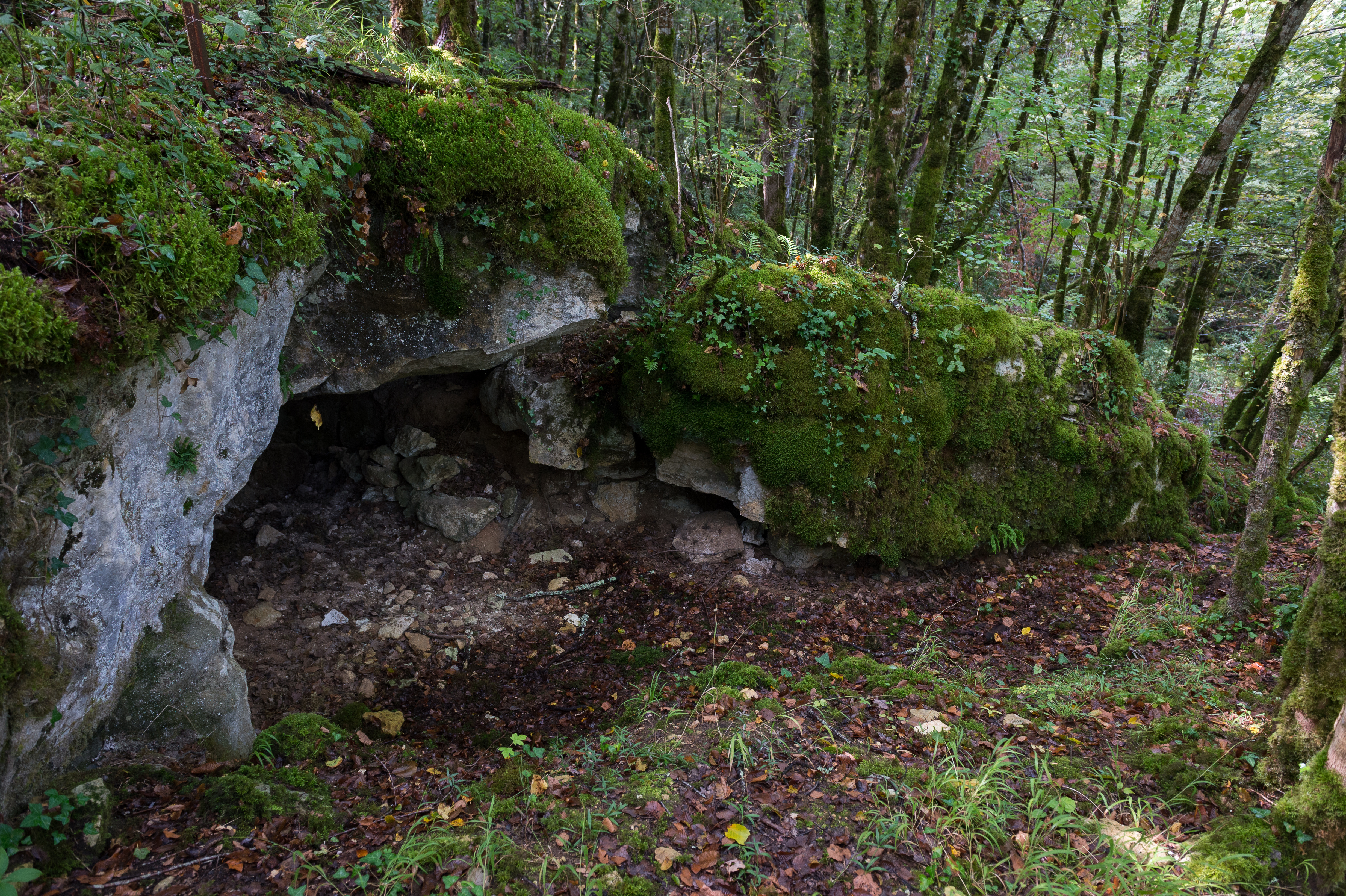 Der Abri du Facteur bei Tursac in Frankreich.